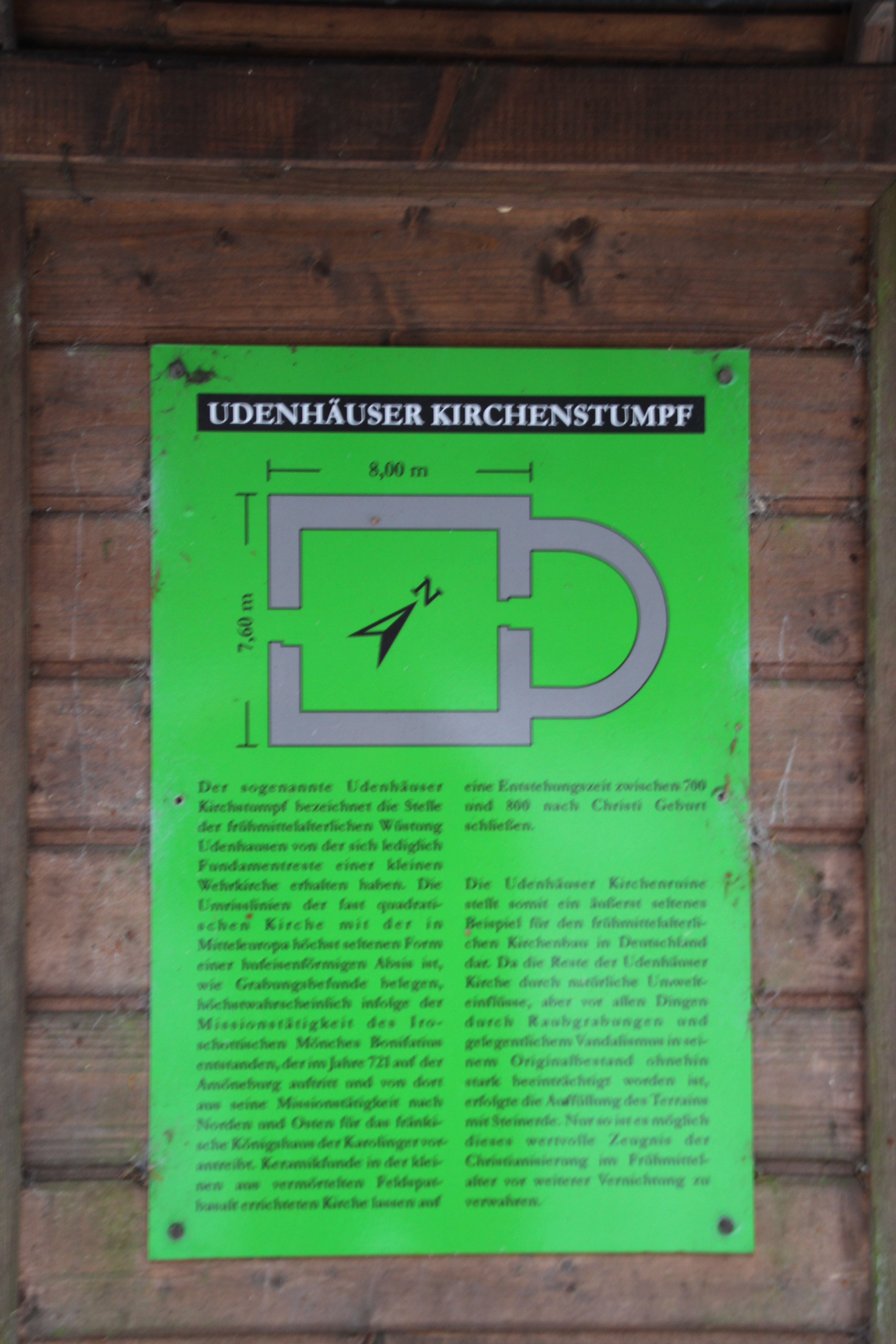 Hinweistafel am Kirchenstumpf